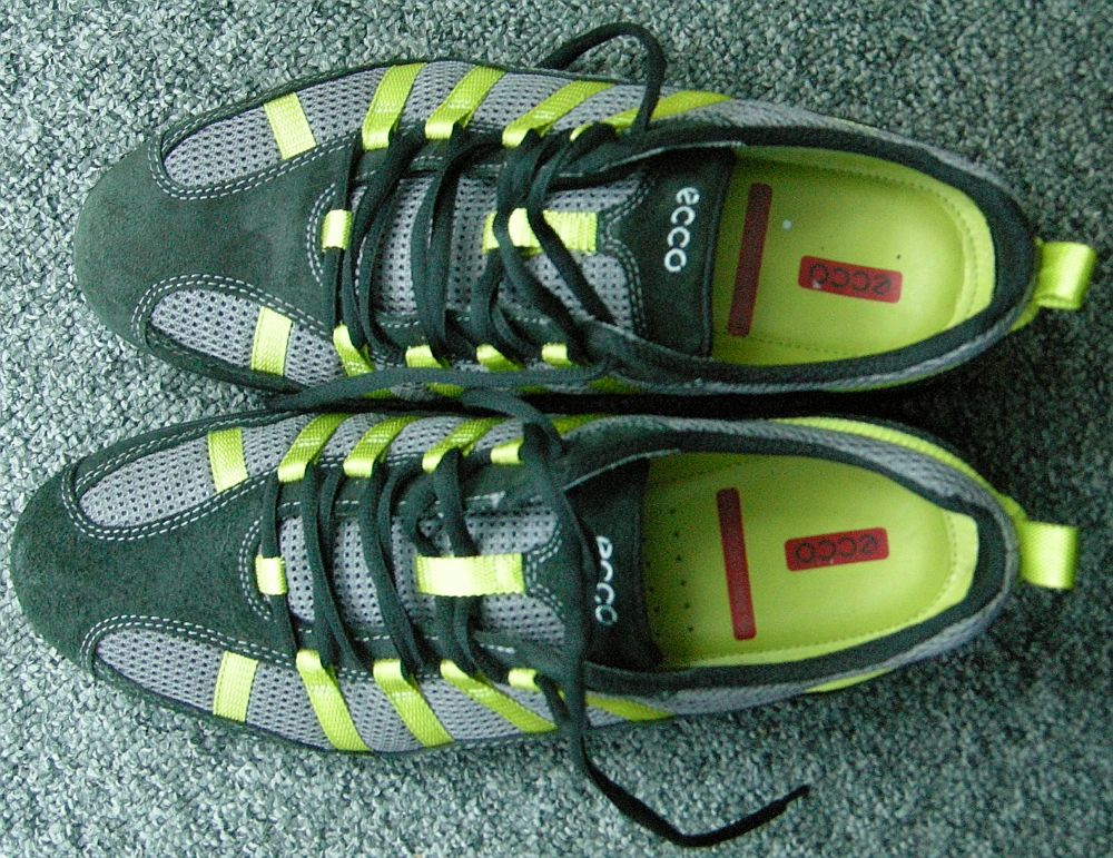 Een onpaar van Ecco sportschoenen, maat 42 (R) en maat 44 (L)